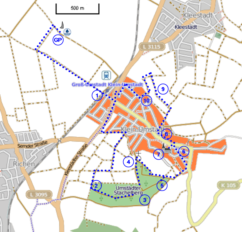 Der Geo- und Lehrpfad Die kleine Bergstraße – Landschaft, Mensch und Umwelt in Klein-Umstadt des Geo-Naturparks Bergstraße-Odenwald